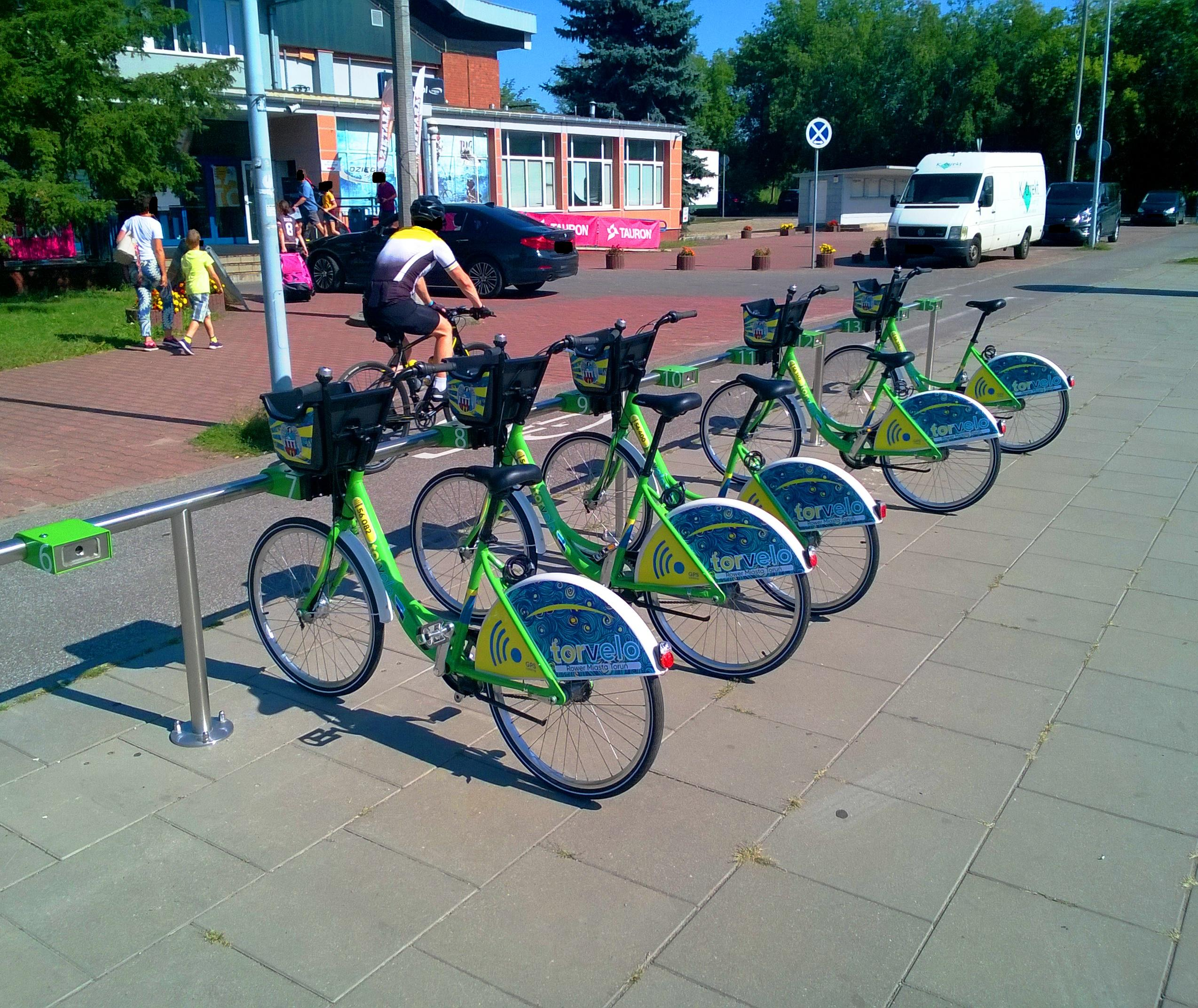 Torvelo w Toruniu15